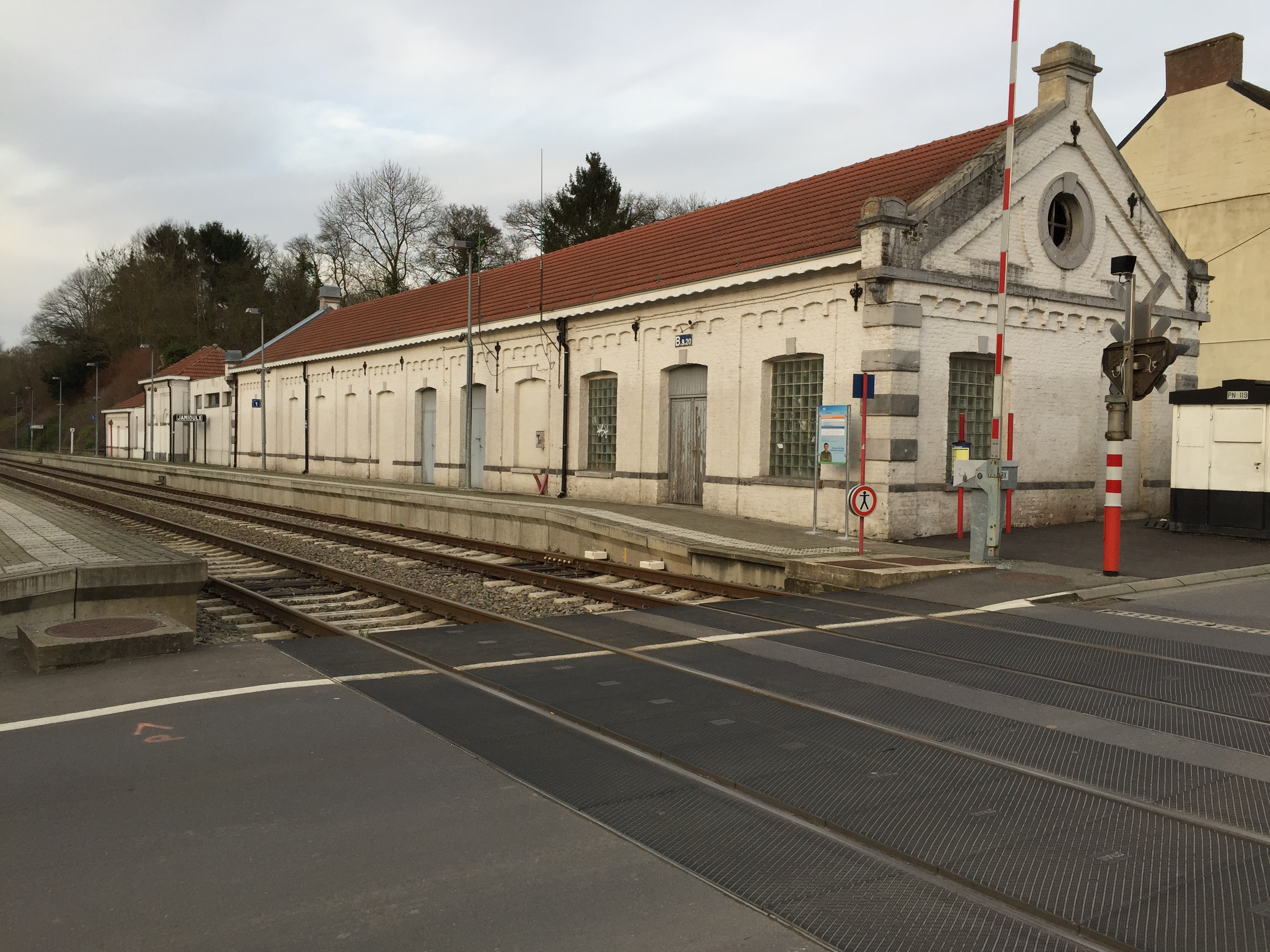 Gare de Jamioulx - Vue générale